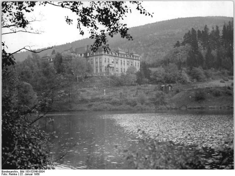 Ilmenau, Goetheschule Zentralbild Reinke-22.1.1958 Schöne deutsche Heimat. UBz: Ilmenau in Thüringen. Die Goetheschule.